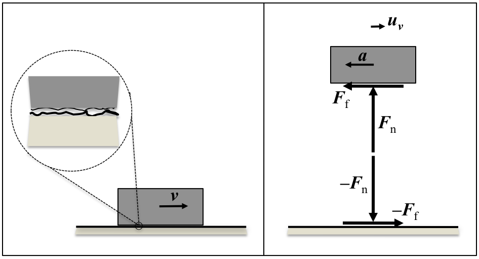 Zoluaren gainean irristatzen ari den gorputz solido bateko eta zoluko marruskadura-indarrak.